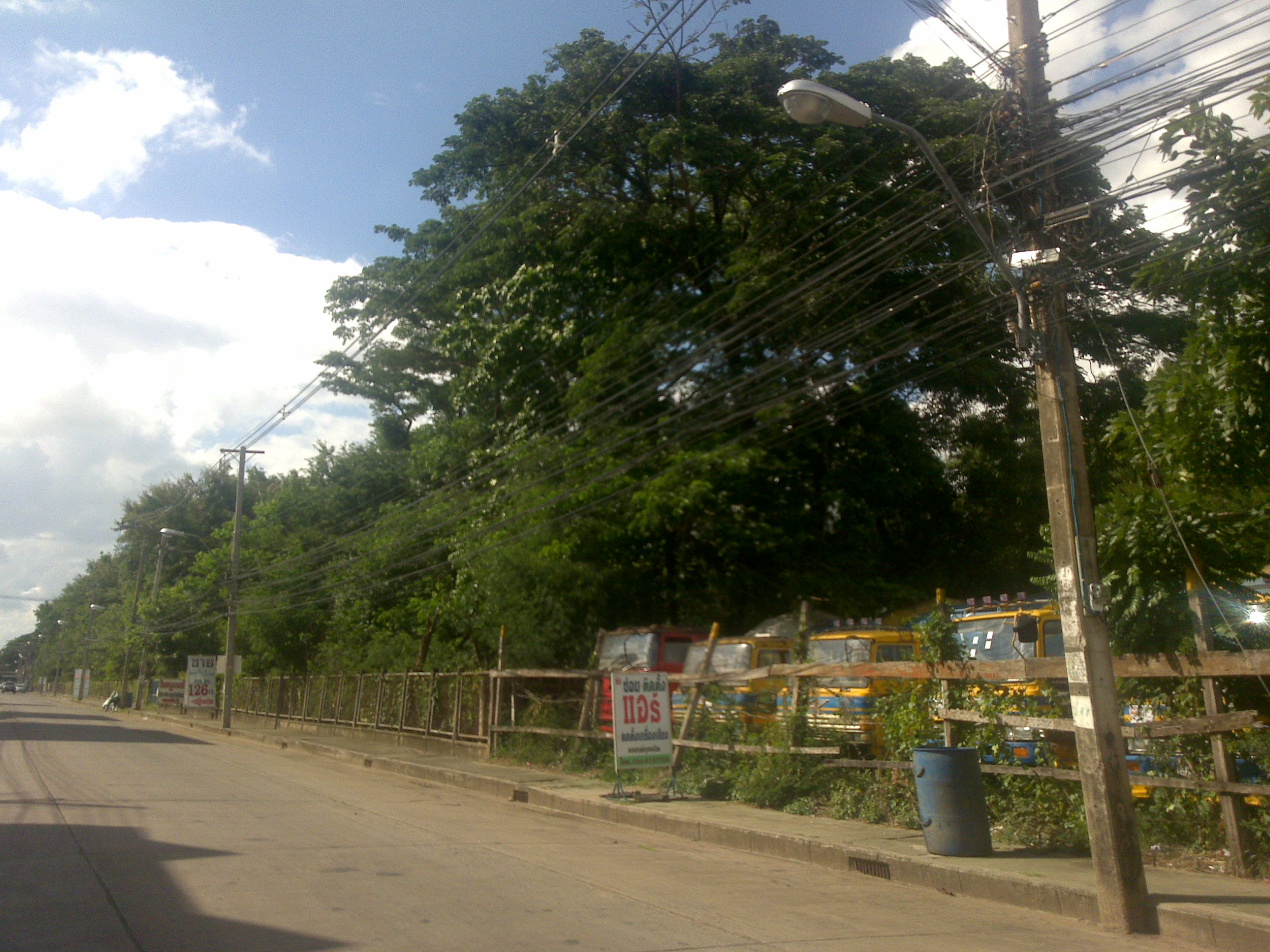 Forest Park in Buriram.